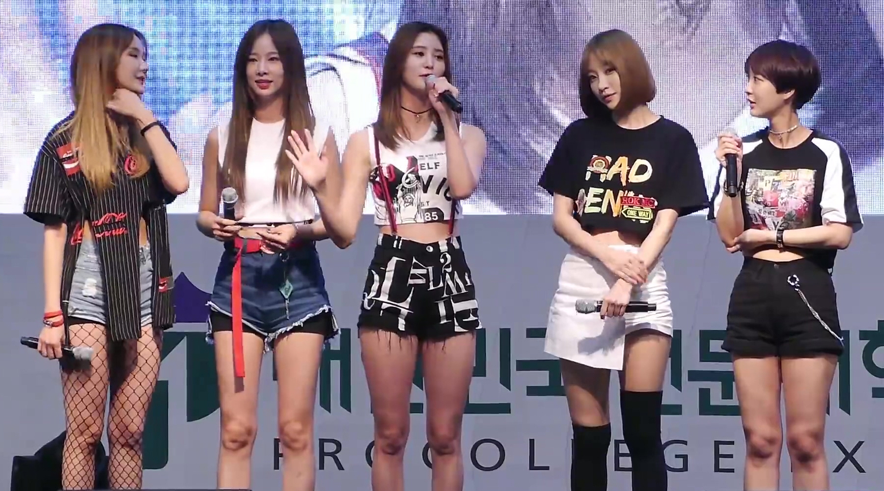 160714 코엑스 공개방송 EXID 직캠 LIE 토크 조윤희의 볼륨을 높여요 (4m 59s)